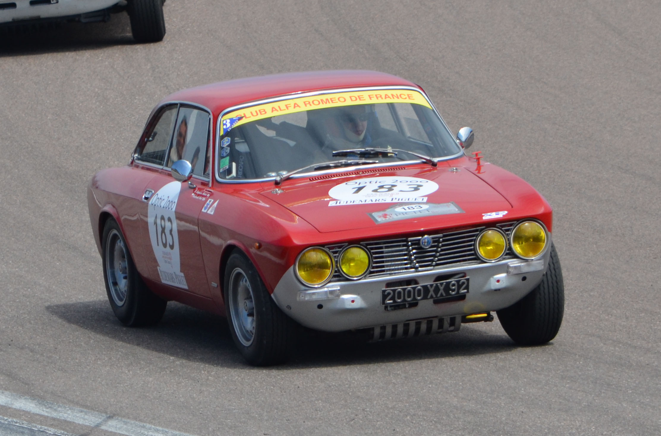 Alfa Roméo 2000 GTV, numéro 183, Tour Auto 2012, étape sur le Circuit de Prenois.